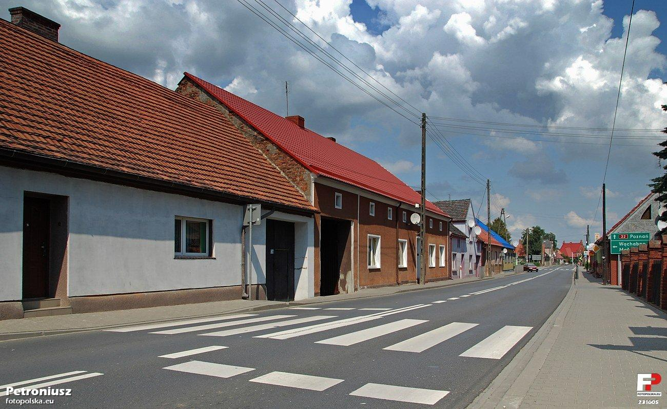 Ulica Poniatowskiego w Kopanicy - widok na stronę północno-zachodnią.